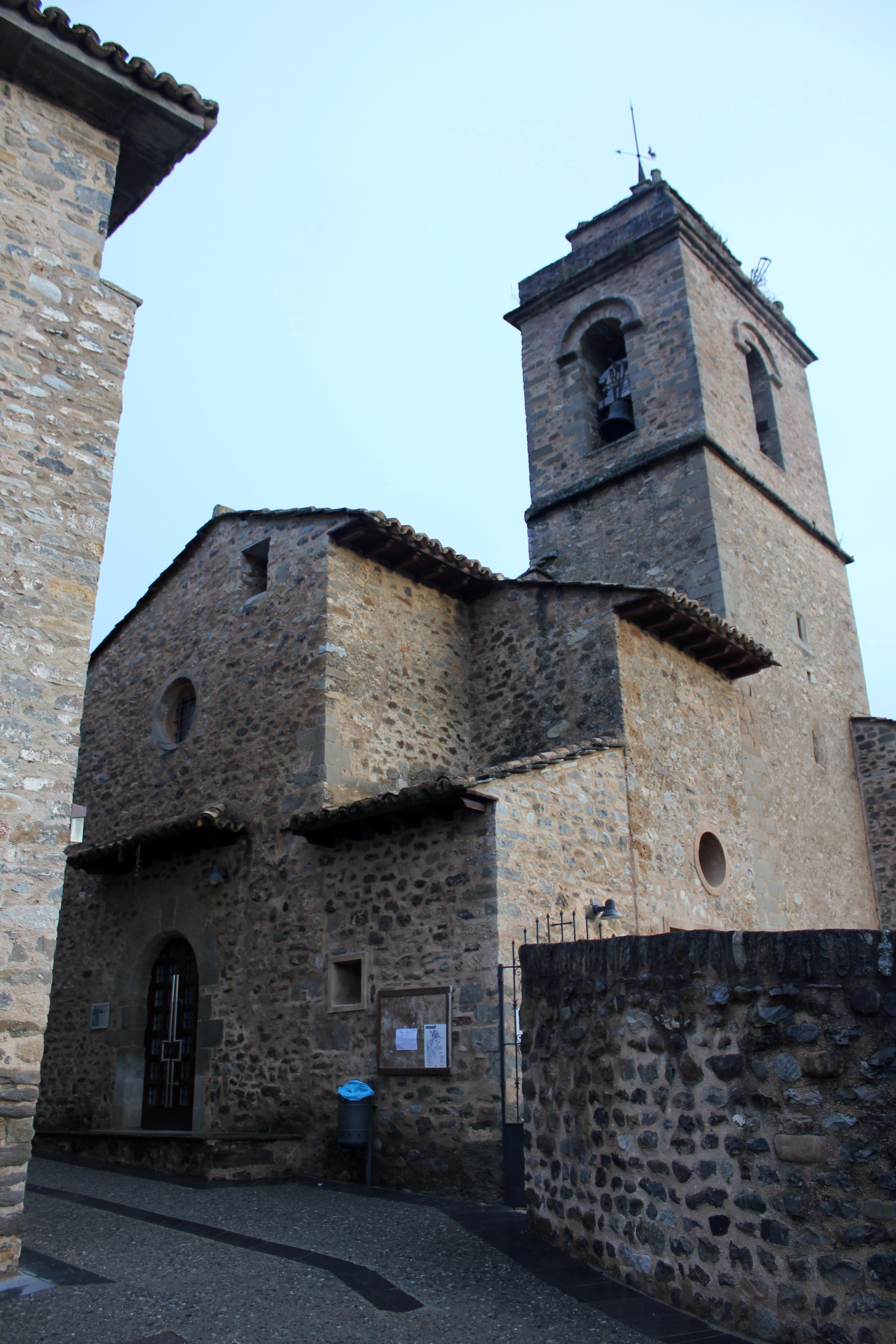 Aragonés: Ilesia parroquial de Santa María de l'Asumpción de Ligüerre.